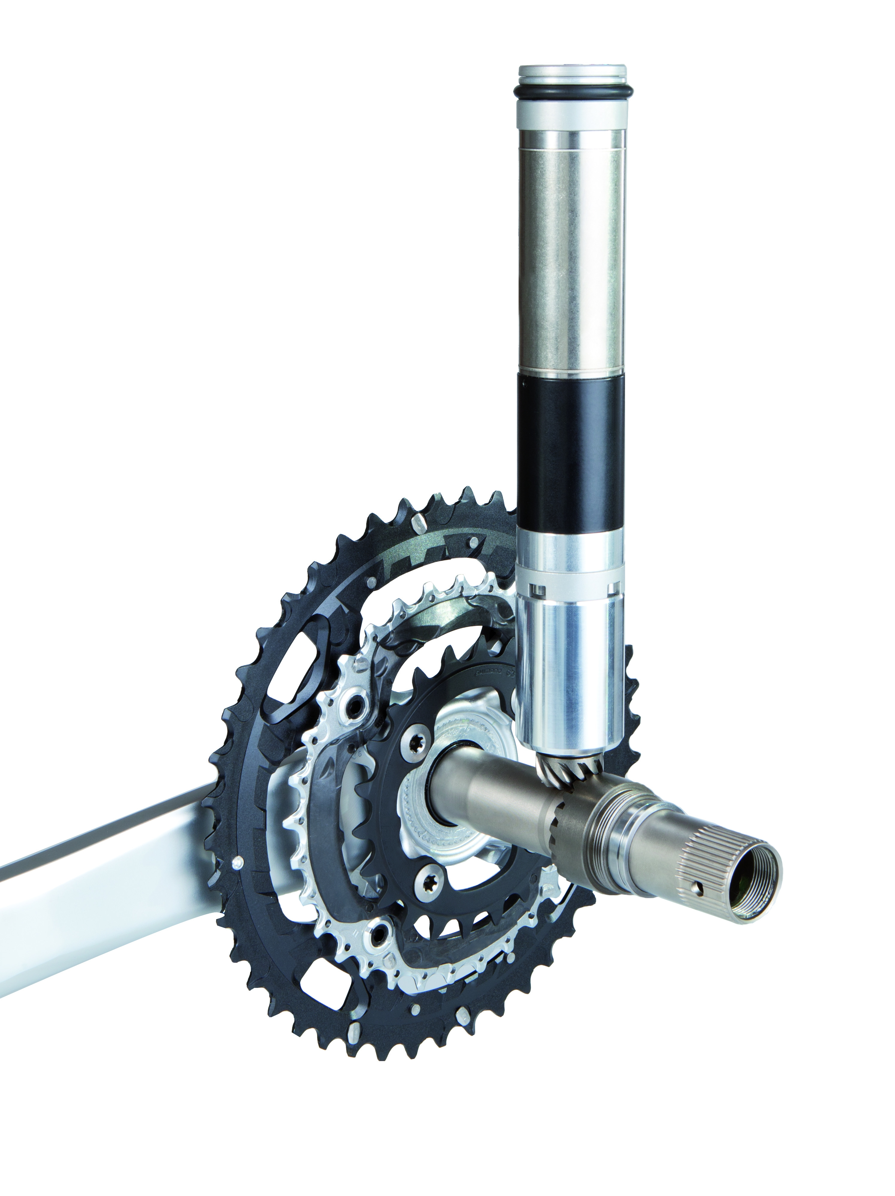 Vivax assist / Gruber Assist